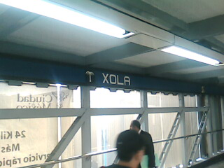 Estacion Xola